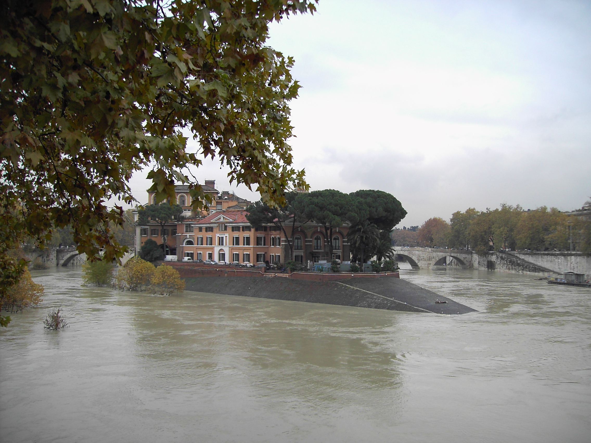 Roma, Isola Tiberina: piena del Tevere 30/11/05